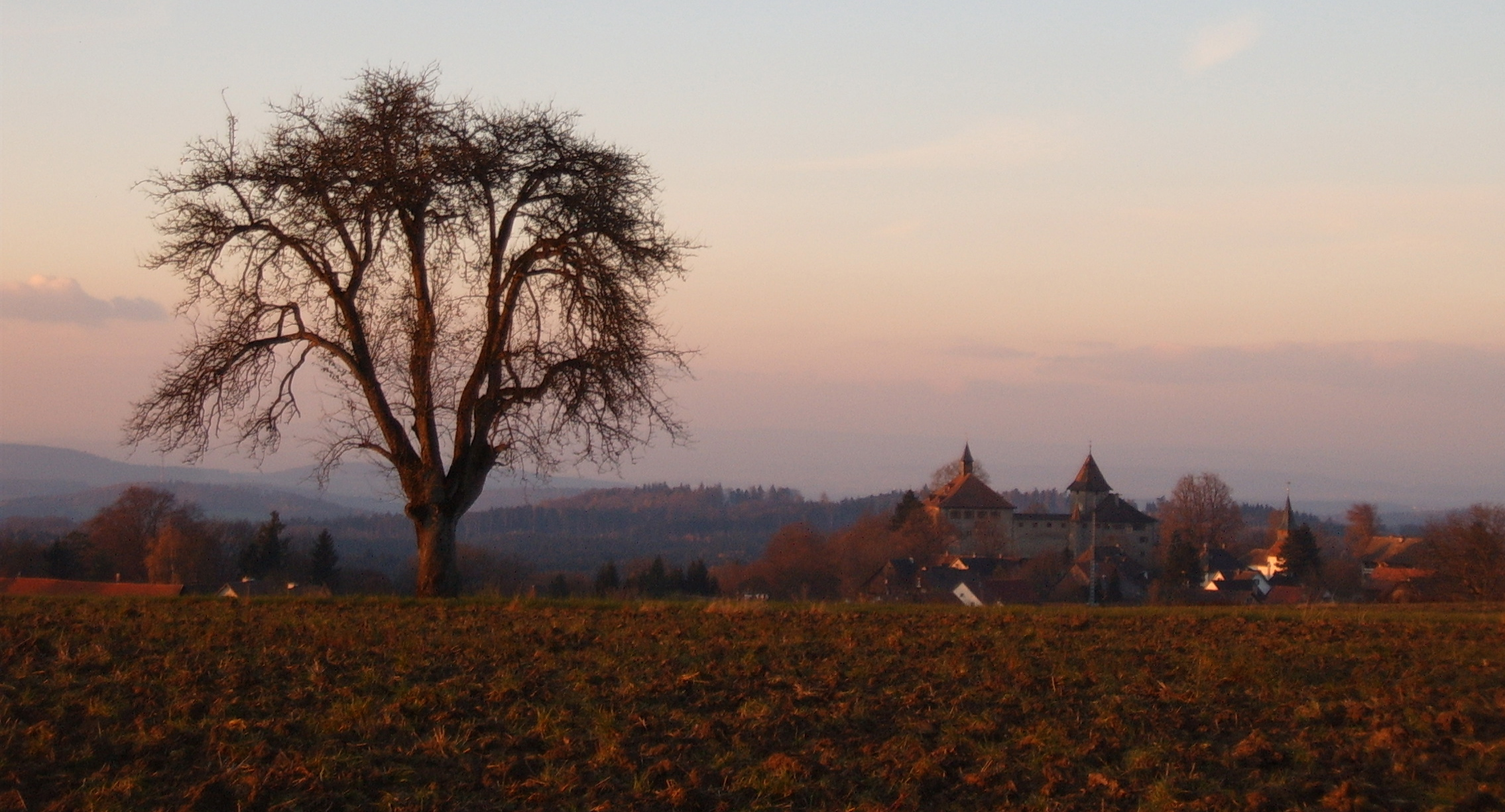 Kyburg Castle, Switzerland Photographer: Markus Bernet Date: 11/19/2005